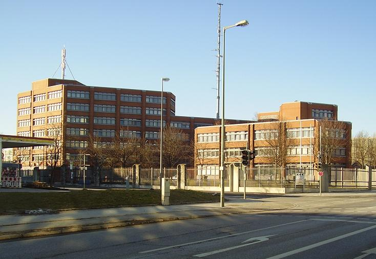 Polizeipräsidium Oberbayern in Knorrstraße (Knorr street), Munich